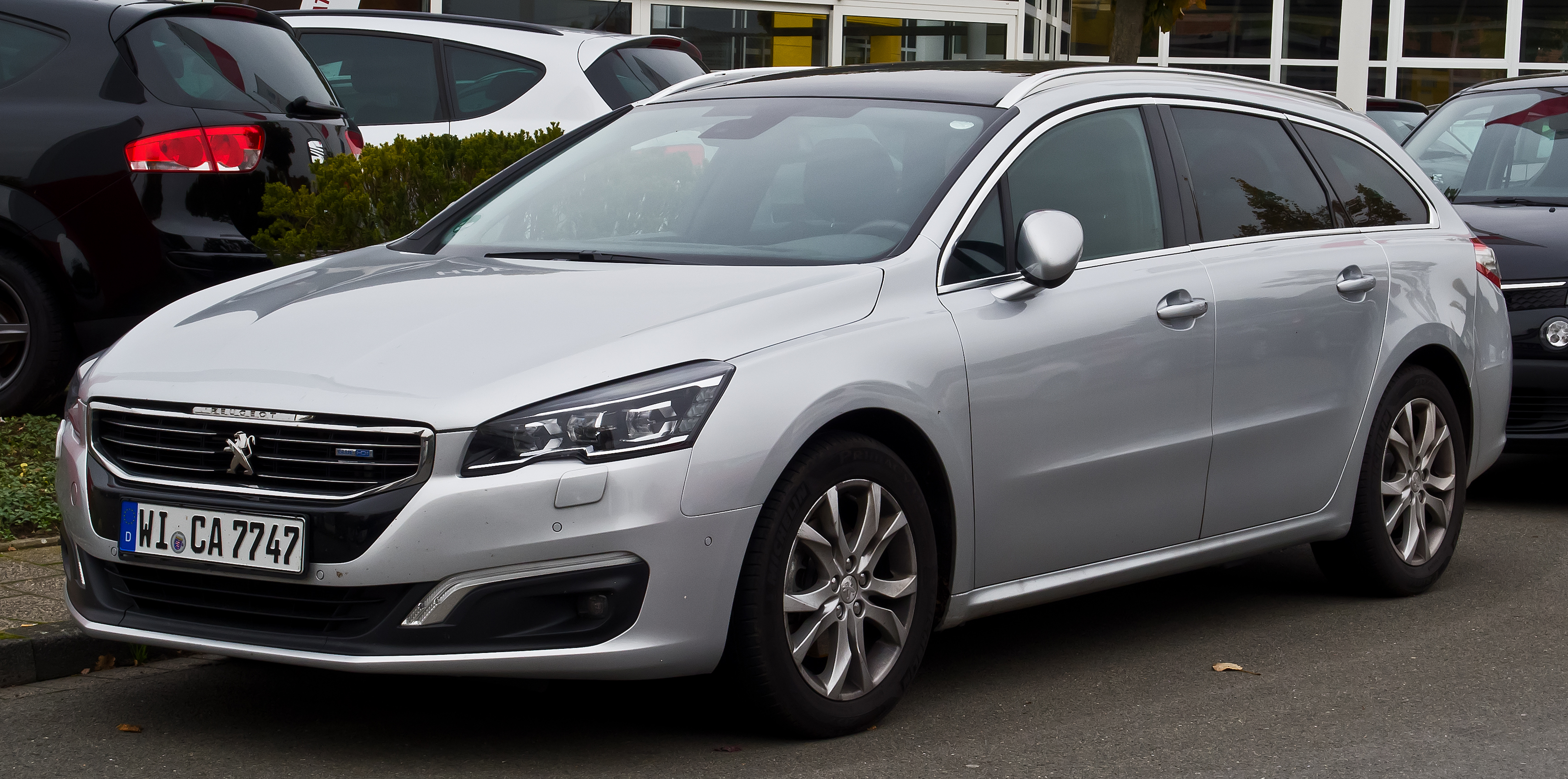 Peugeot 508 SW BlueHDi 150 STOP & START Allure (Facelift)